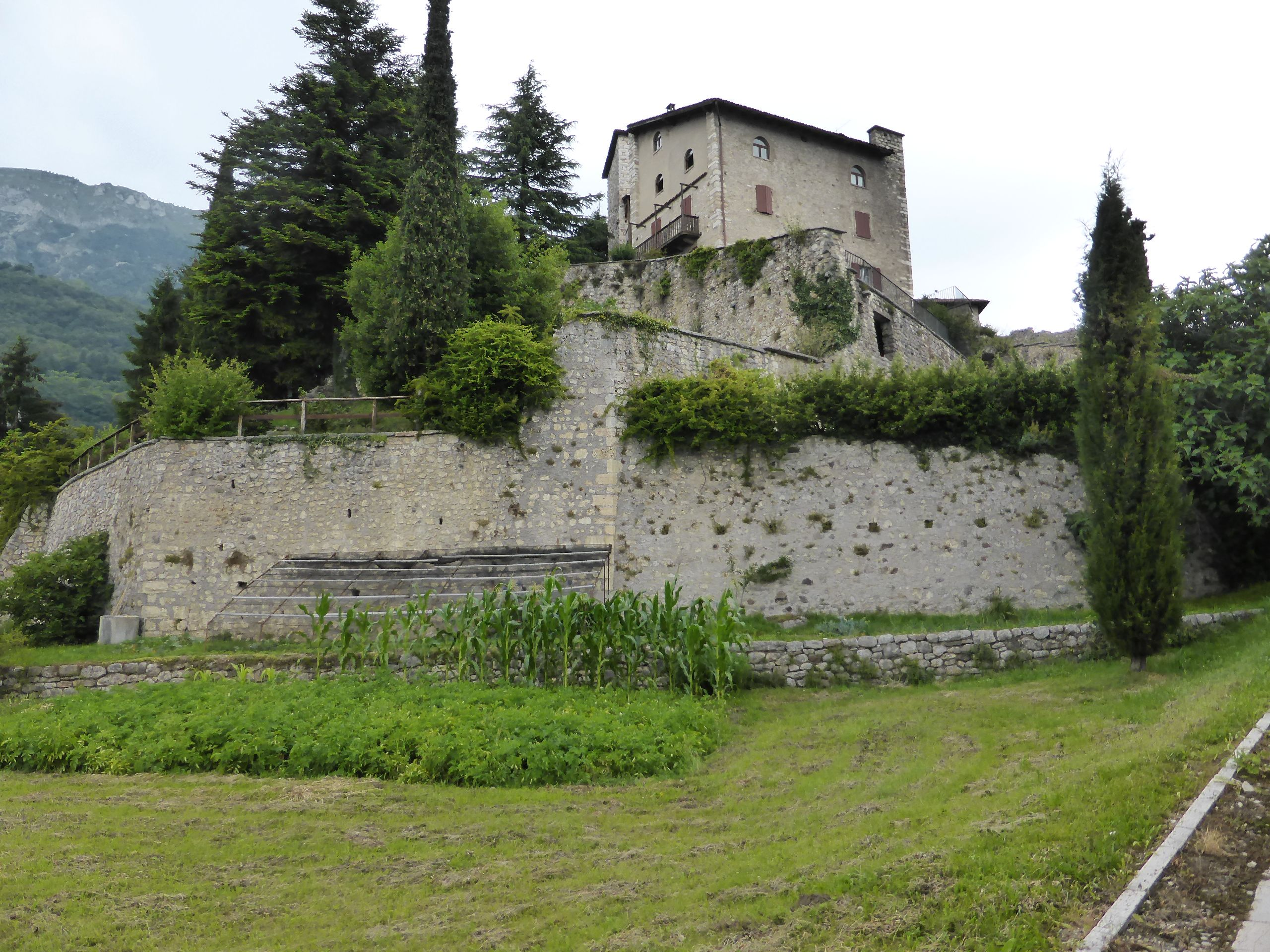 Schloss Castellano